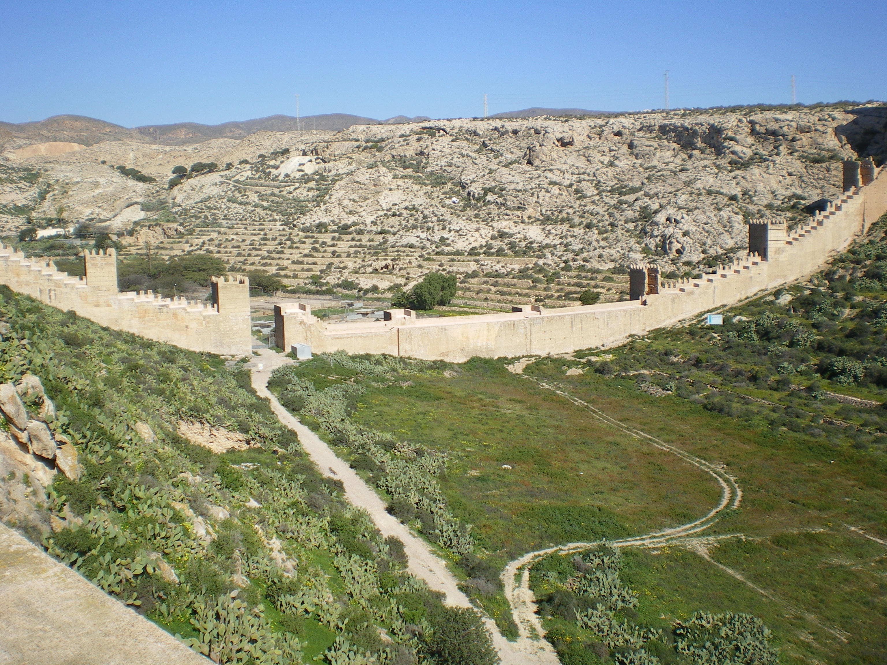 Lienzo de la murralla del rey de Almería (España) Jairán, al norte de la ciudad, desde el sureste.